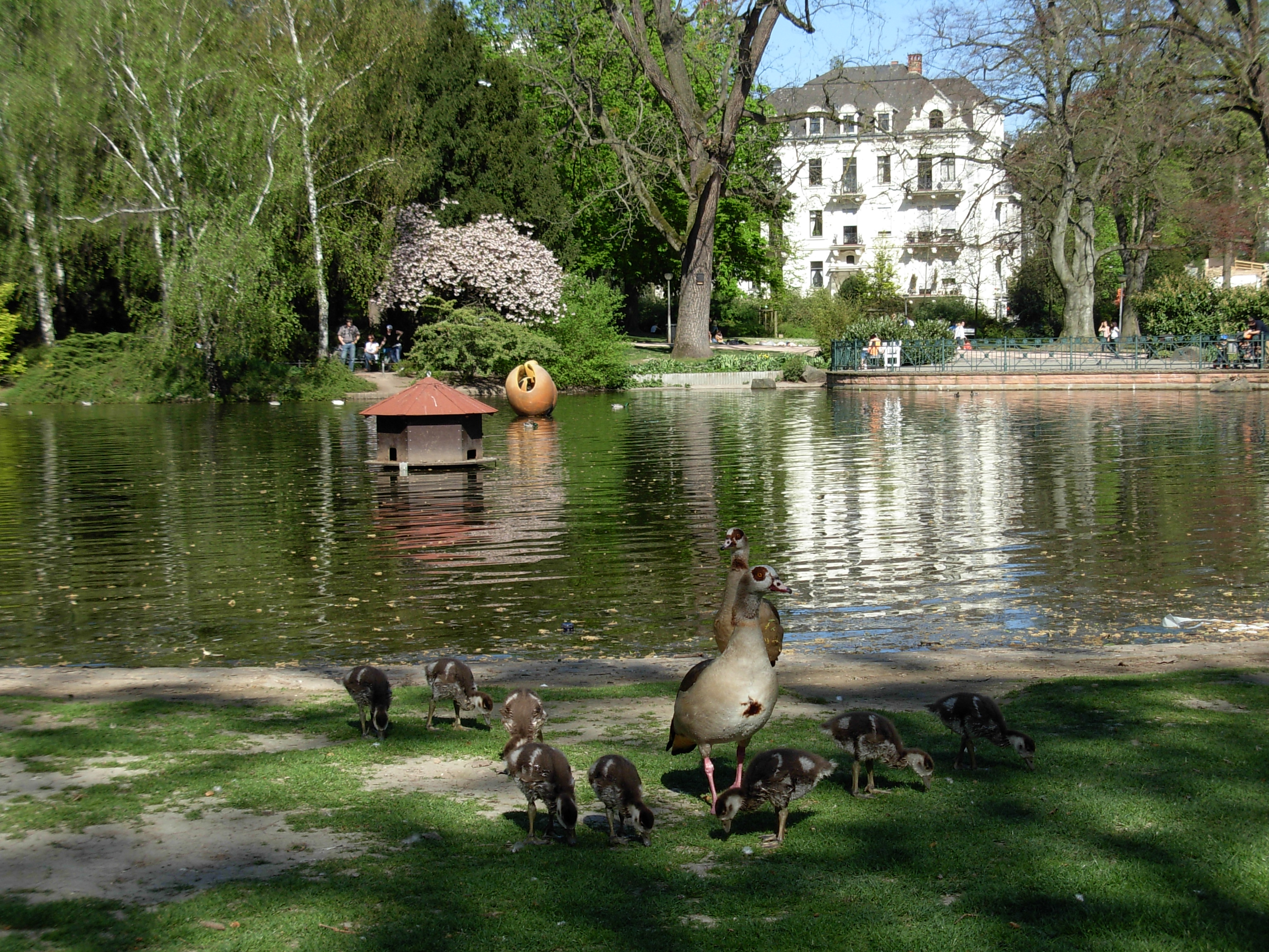 Weiher mit Nilgänsen am Warmen Damm in Richtung Paulinenstraße